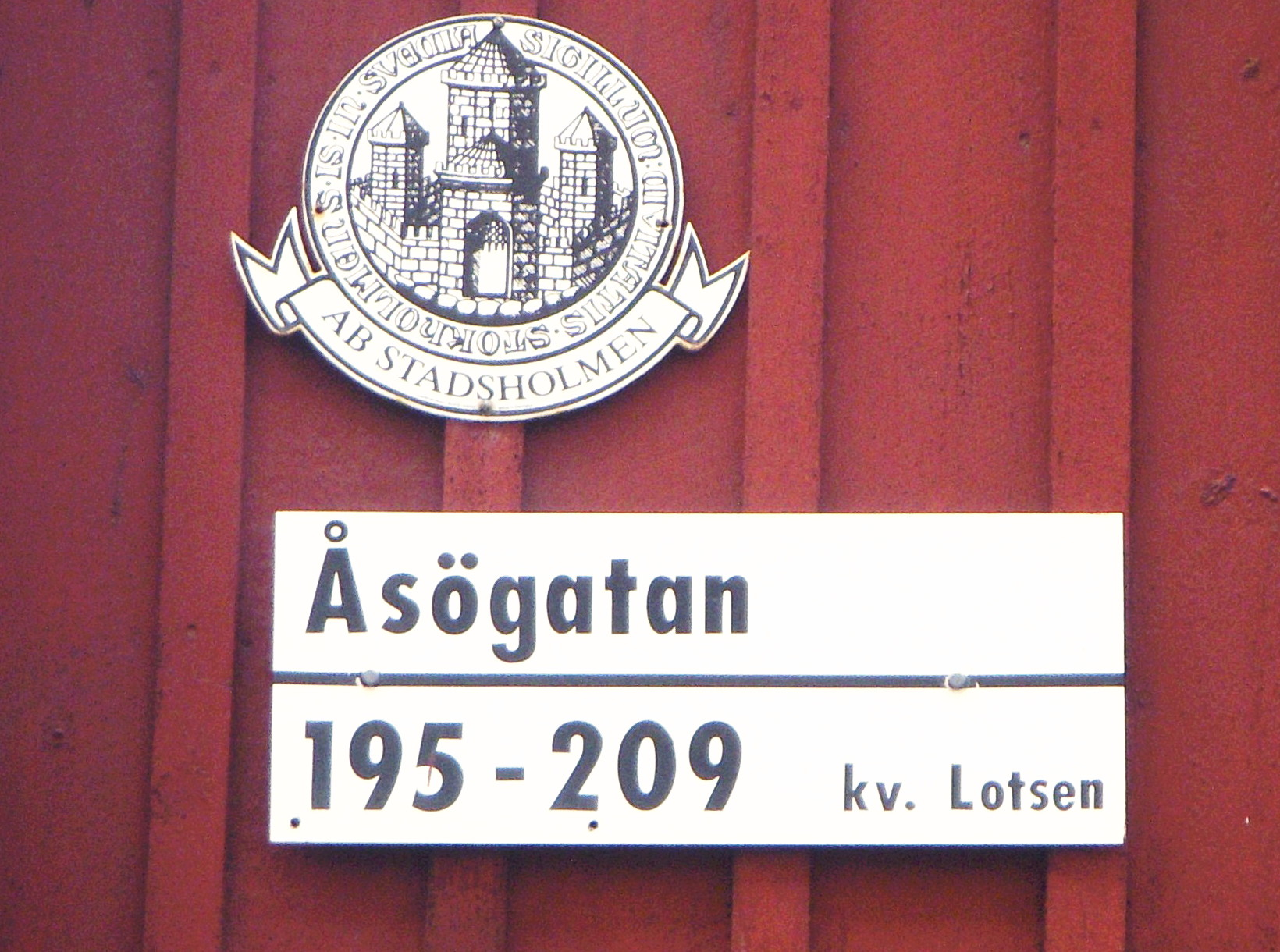 Kvateret Lotsen på Södermalm i Stockholm